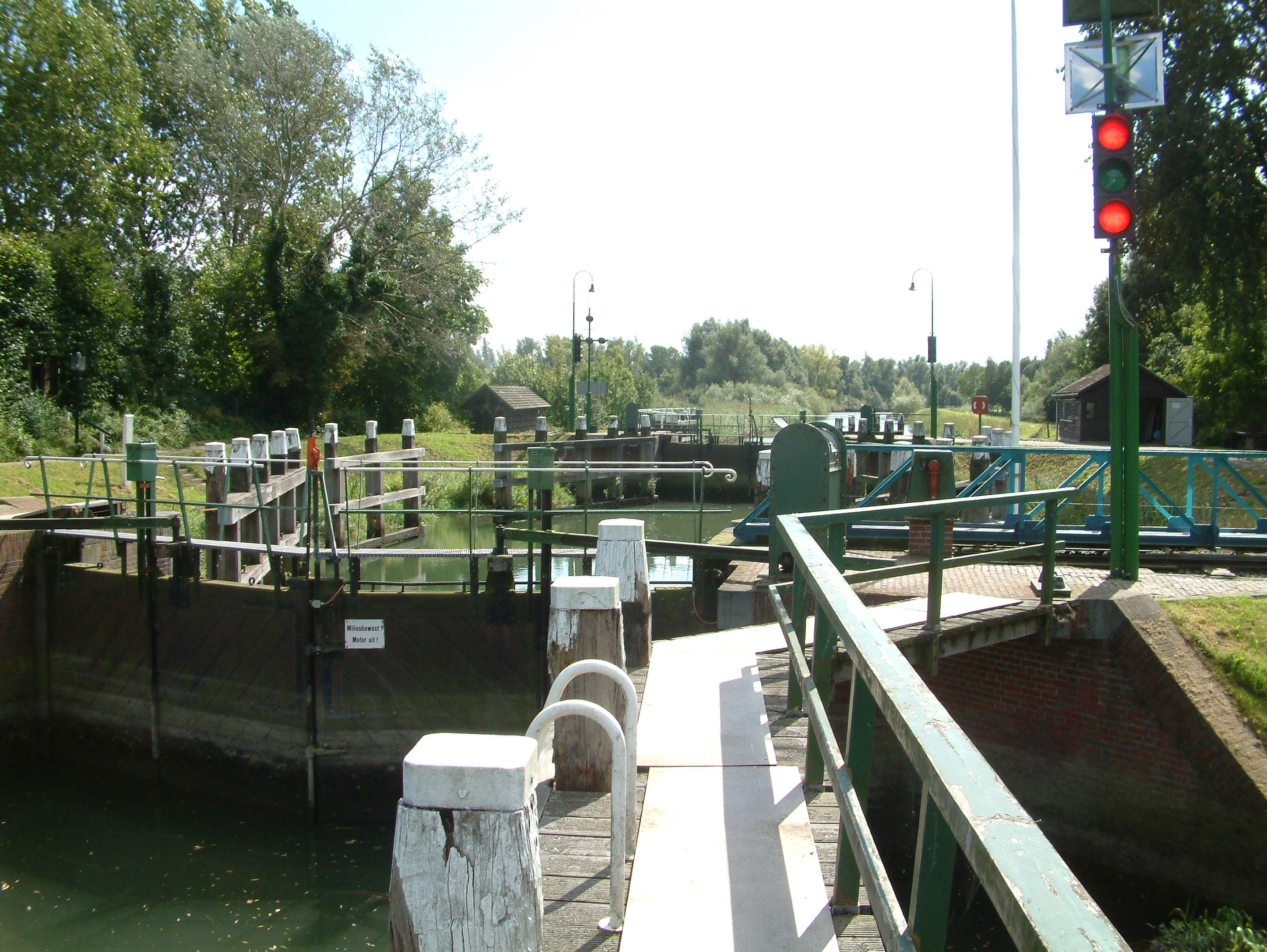 De Helsluis tusssen de Beneden Merwede tegenover Sliedrecht en de Helsloot